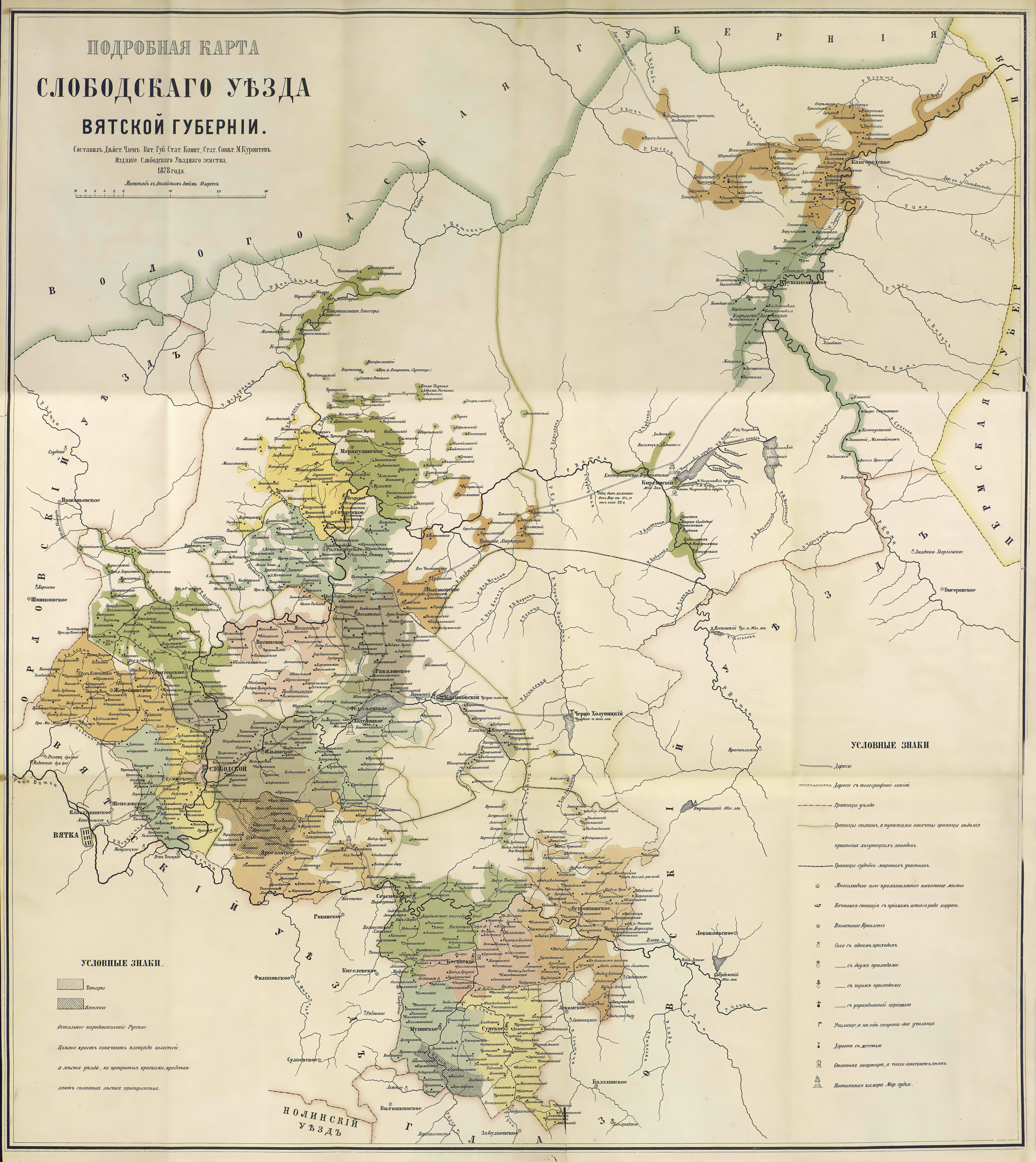 Карта Слободского уезда Вятской губернии 1878 года